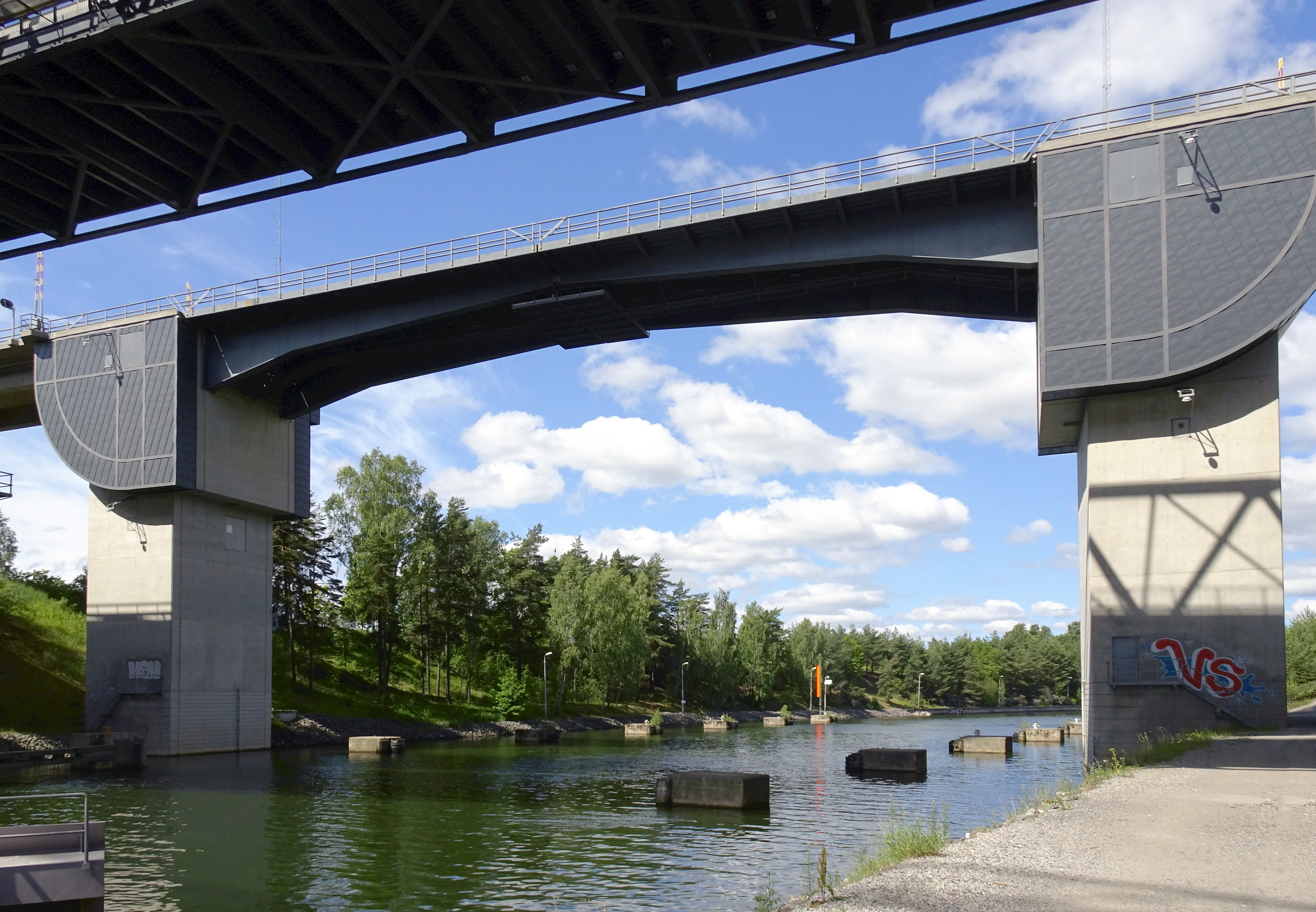 Saltsjöbron (under E4-bron)